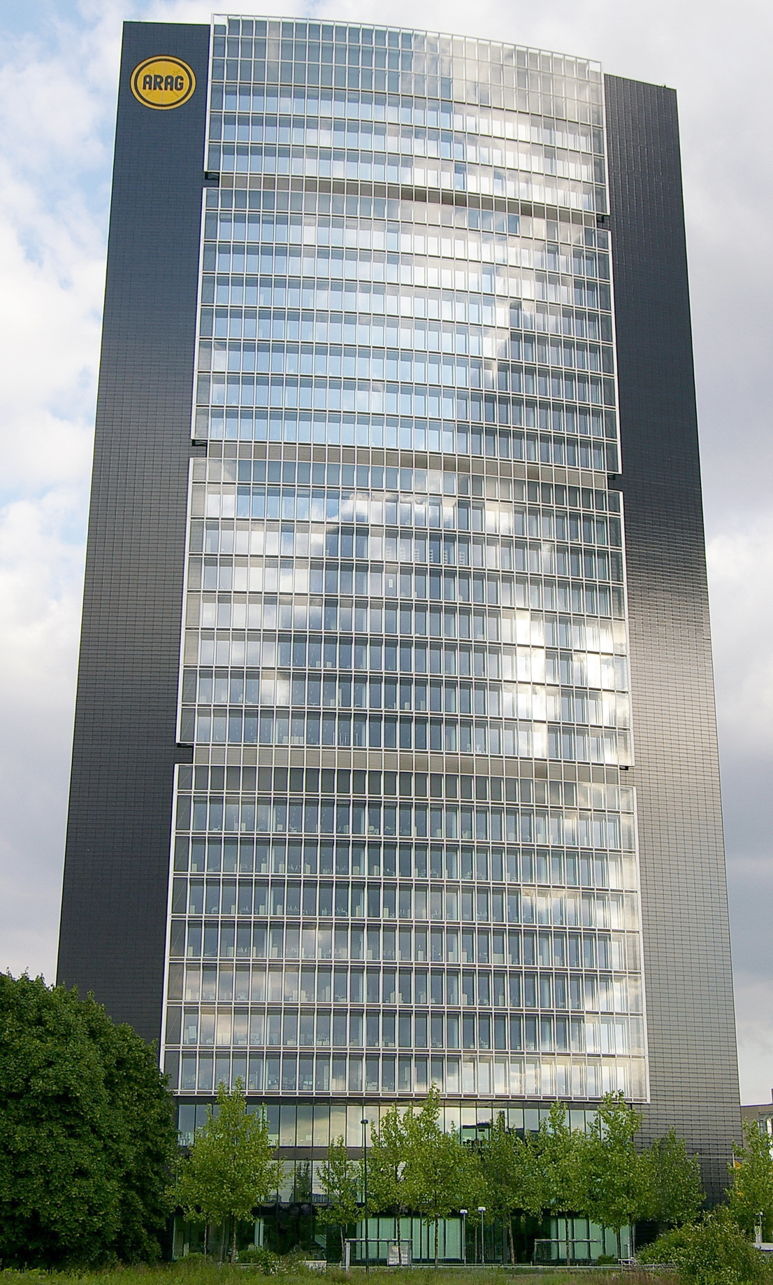 ARAG-Tower in Düsseldorf